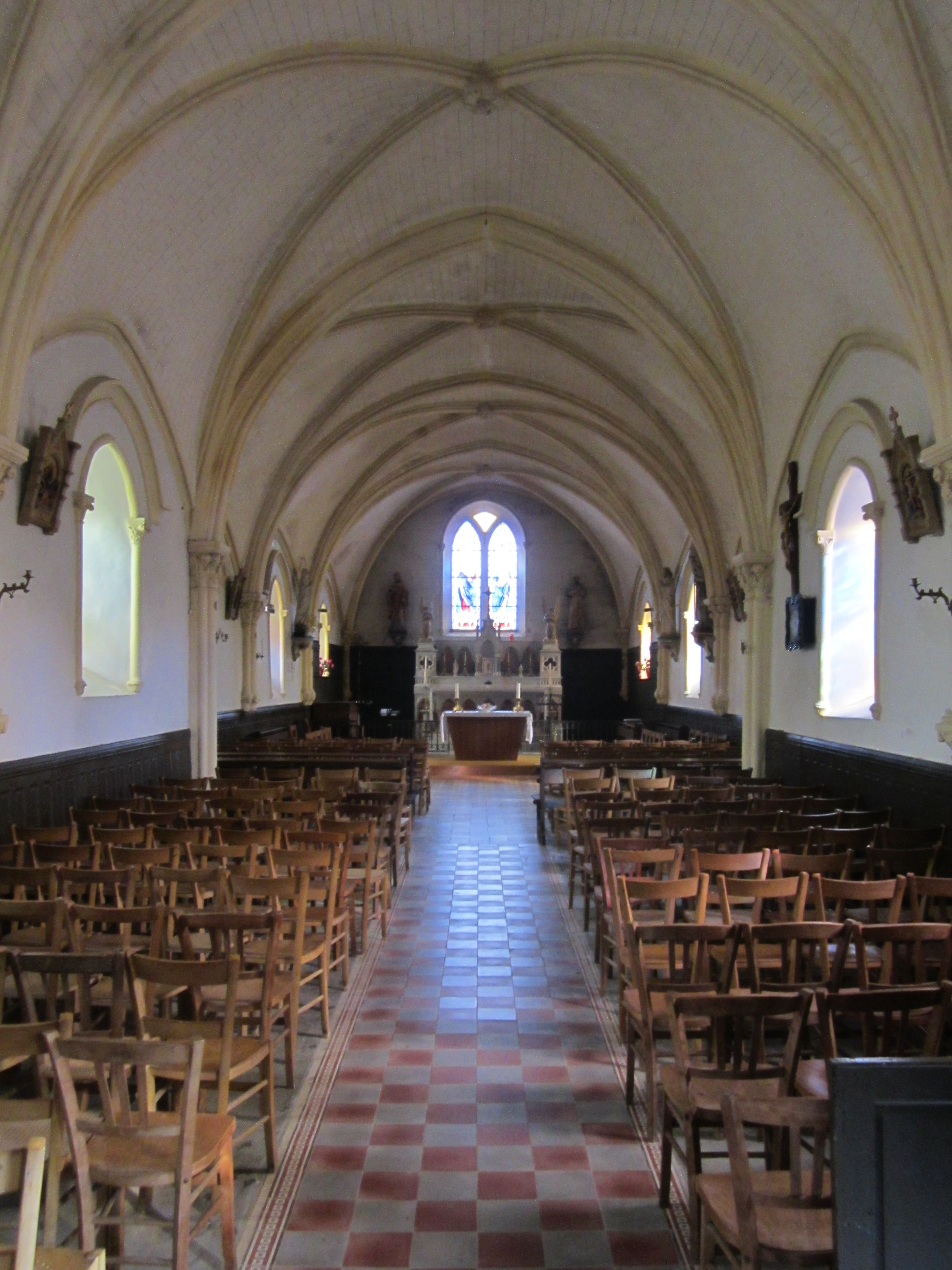 Carneville, Manche